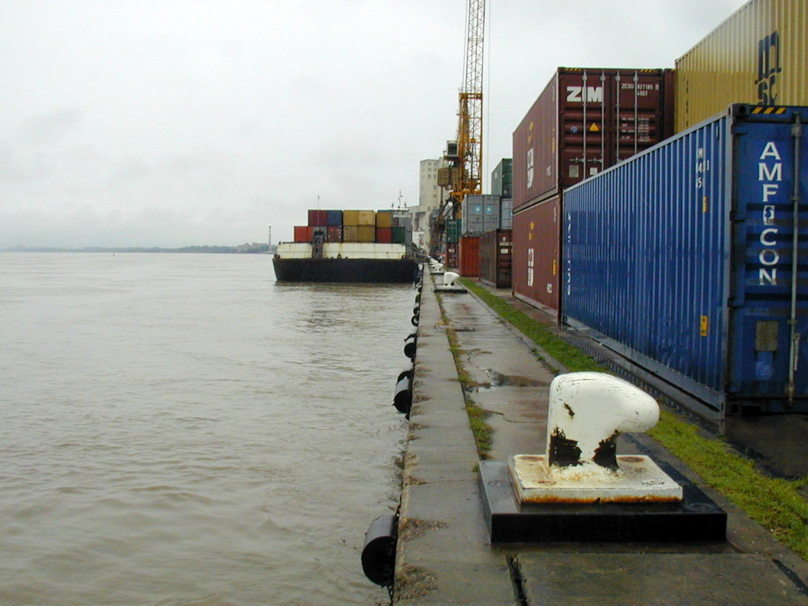 Port of Rosario Argentina , container yard/ ES: detalle del pto de Rosario, muelle para contenedores